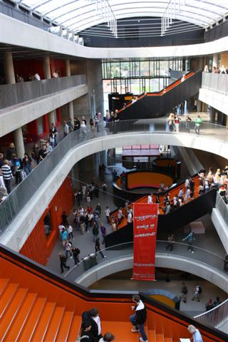 Interiør fra THVS 1. skoledag 17. august 2009